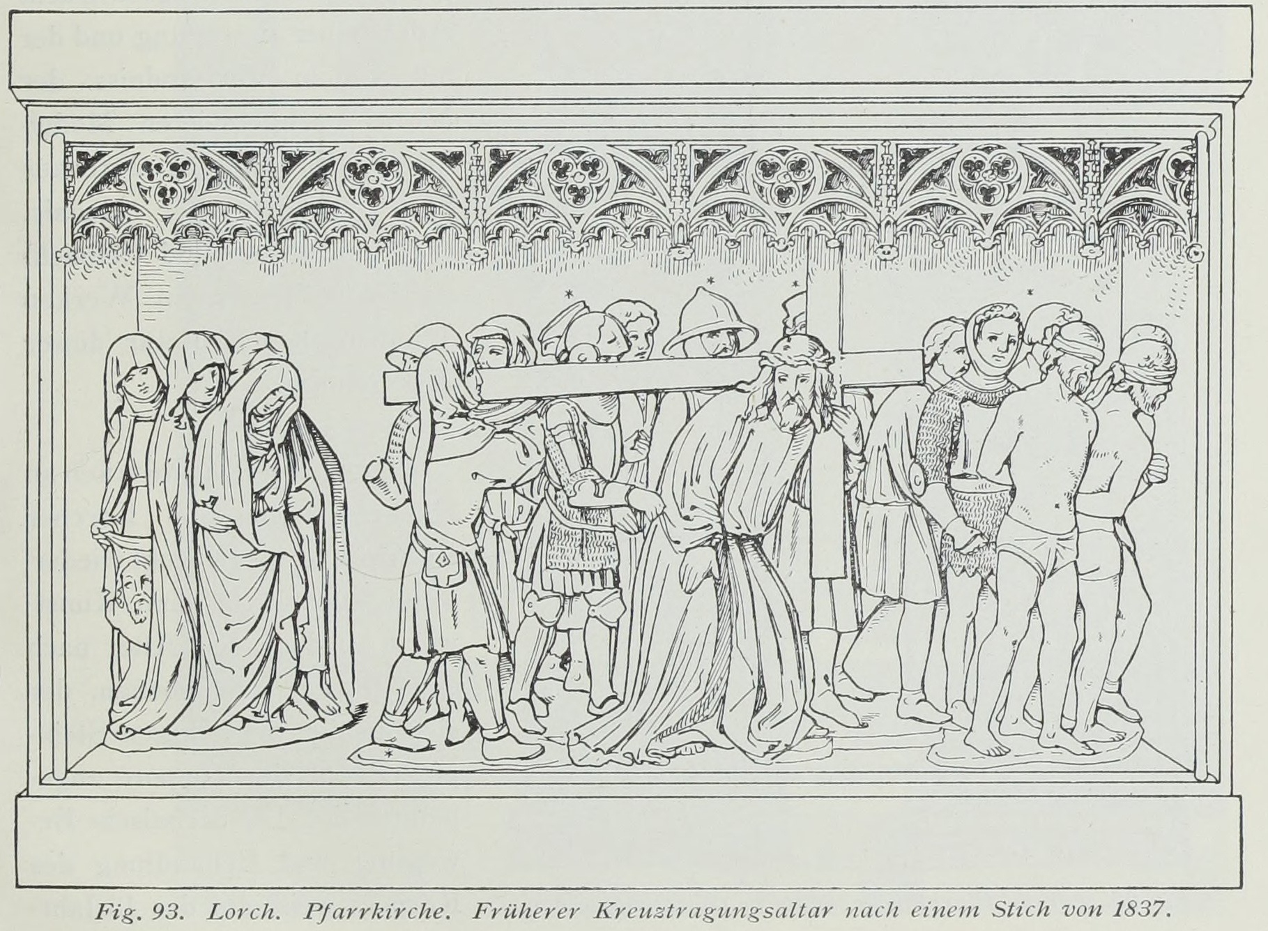 Lorch Pfarrkirche Früherer Kreuztragungsaltar mach einem Stich von 1837